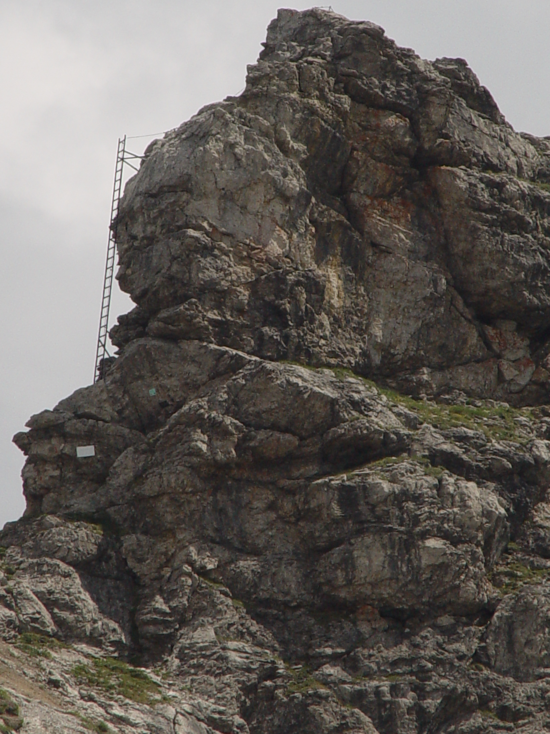 Blick unterhalb des Nebelhorns auf den Hindelanger Kletterstieg